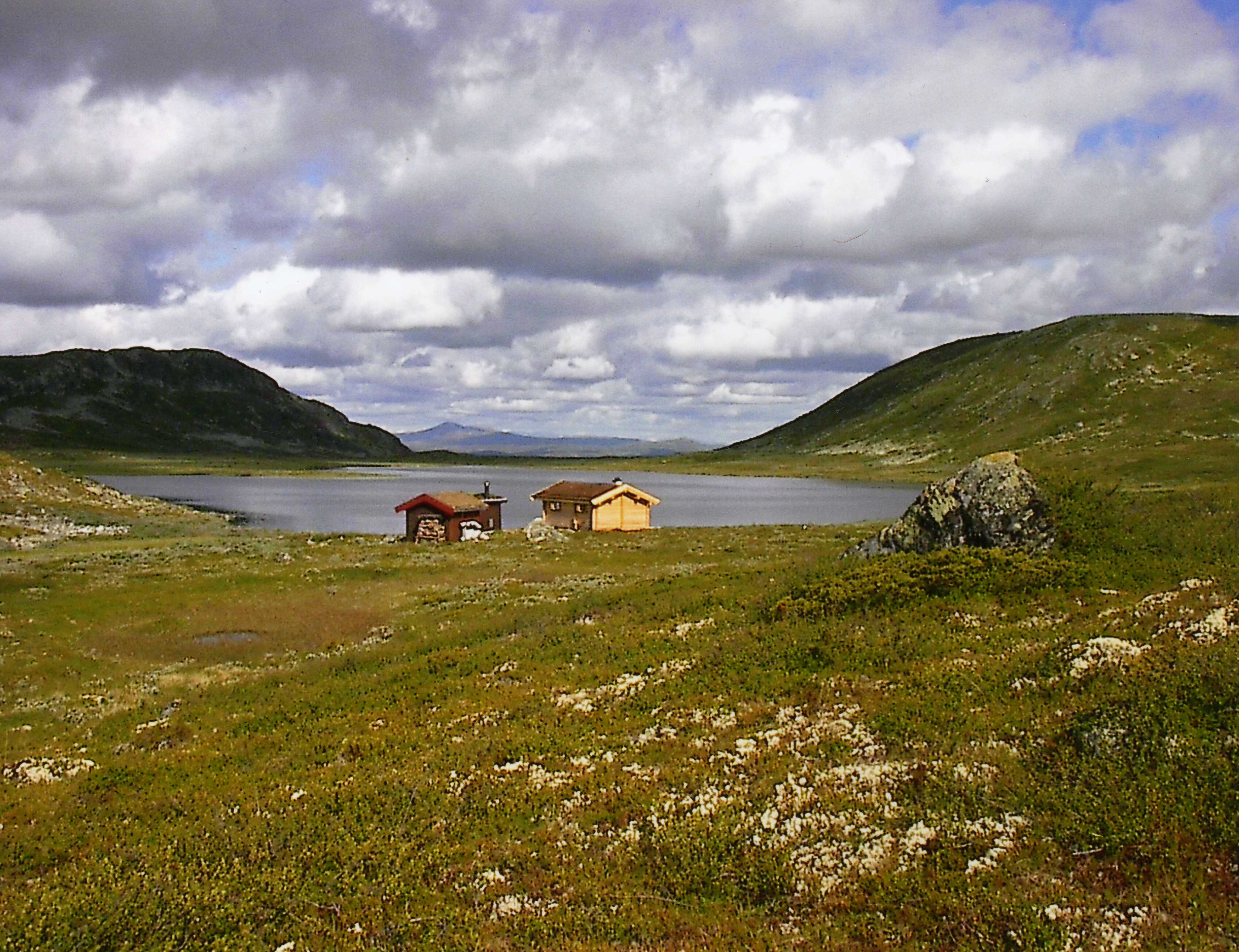 Utleiehytta til Torpa Fjellstyre med Røssjøkolltjernet bak. I det fjerne skimtes Jotunheimen.